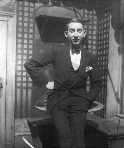 Mischa Spolianski ca. 1914